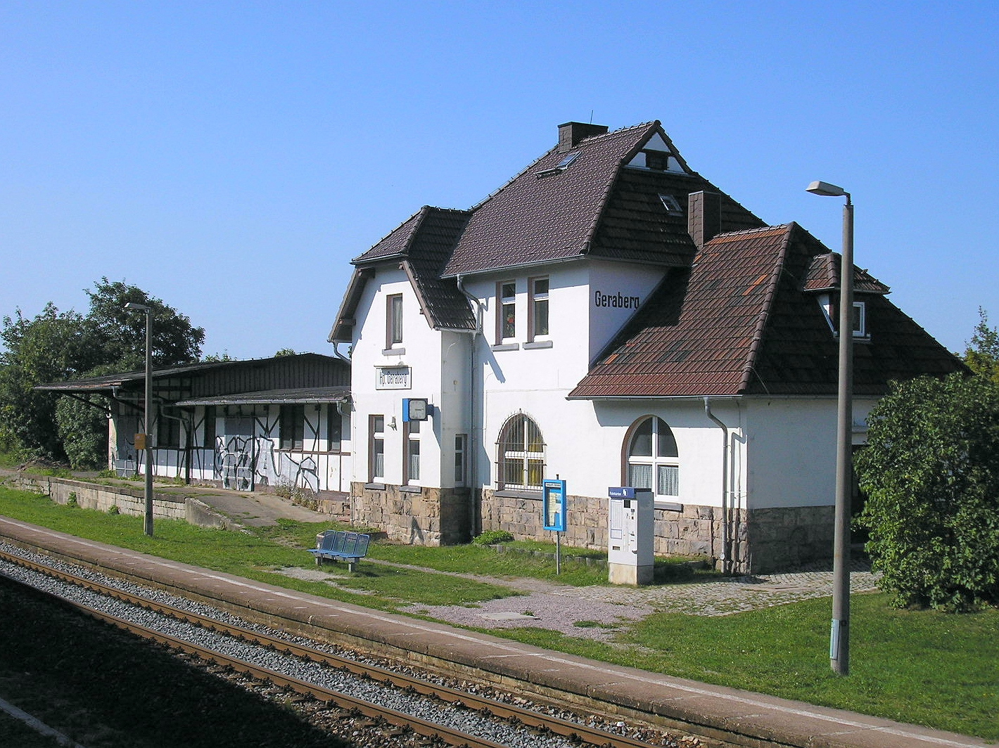 Der Bahnhof von Geraberg im Ilm-Kreis (Thüringen, Deutschland)